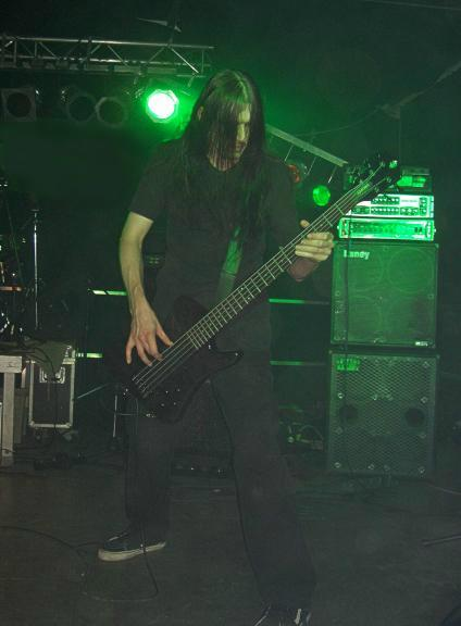 Tobias Below, Bassist von My Insanity